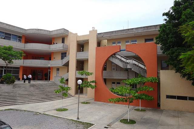 Universidad Autonoma de San Luis Potosi campus Zona Huasteca